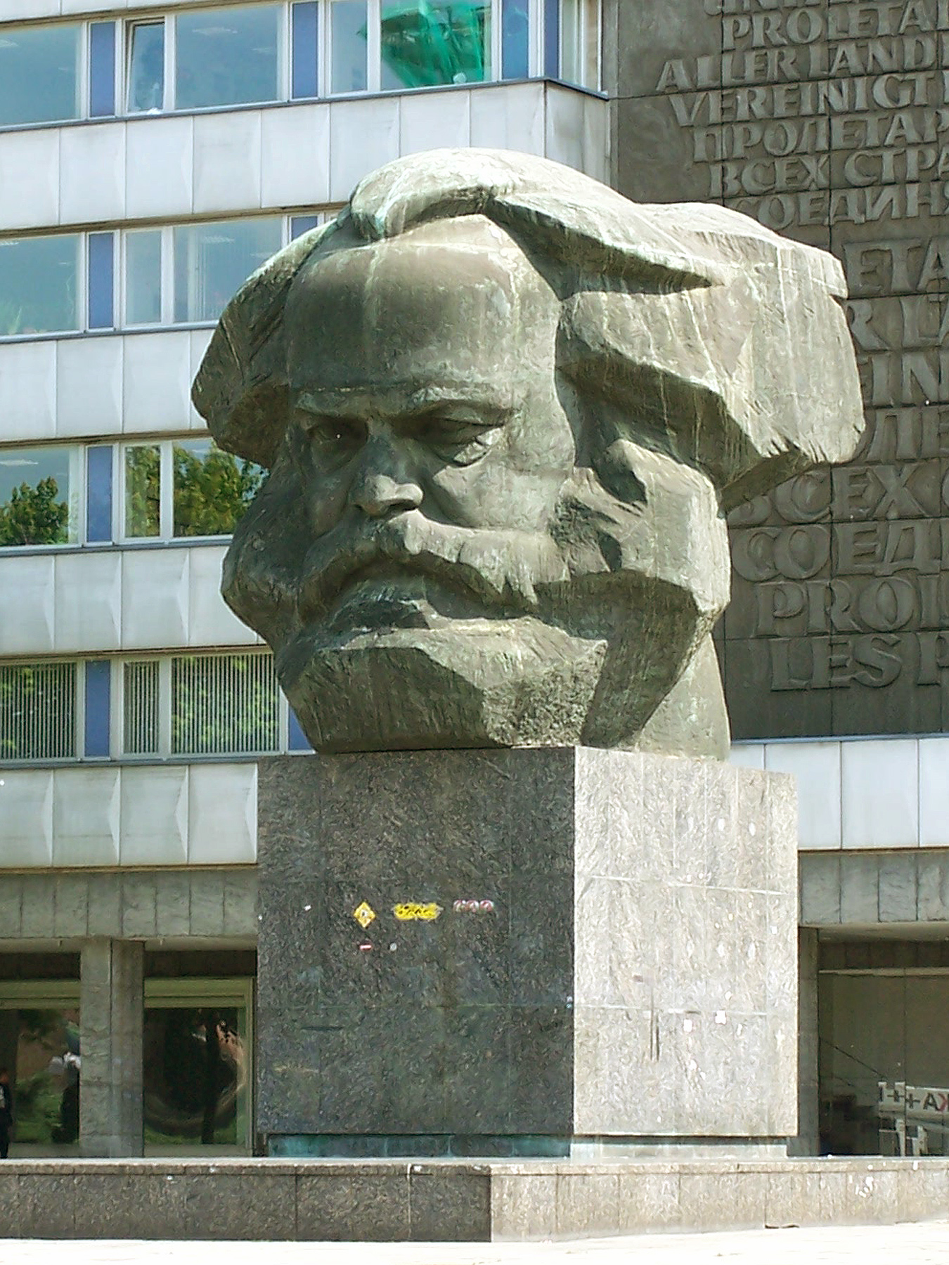 From de wiki. das Karl-Marx-Monument in der Brückenstraße in Chemnitz